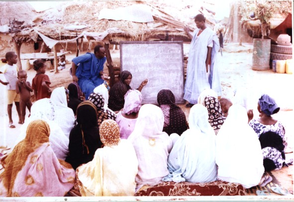 Séance d'alphabétisation à Maghama